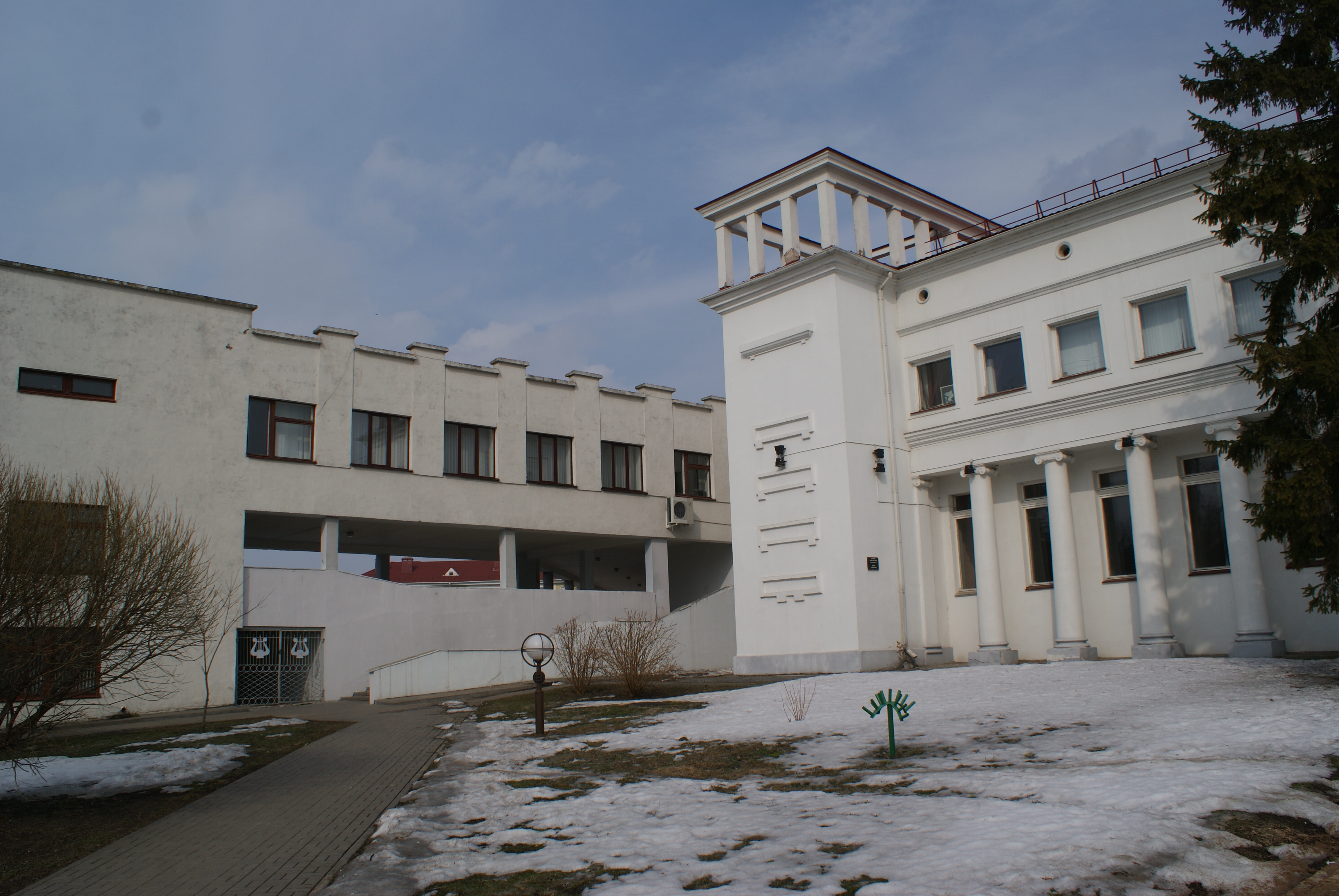 Слуцк, палац культуры